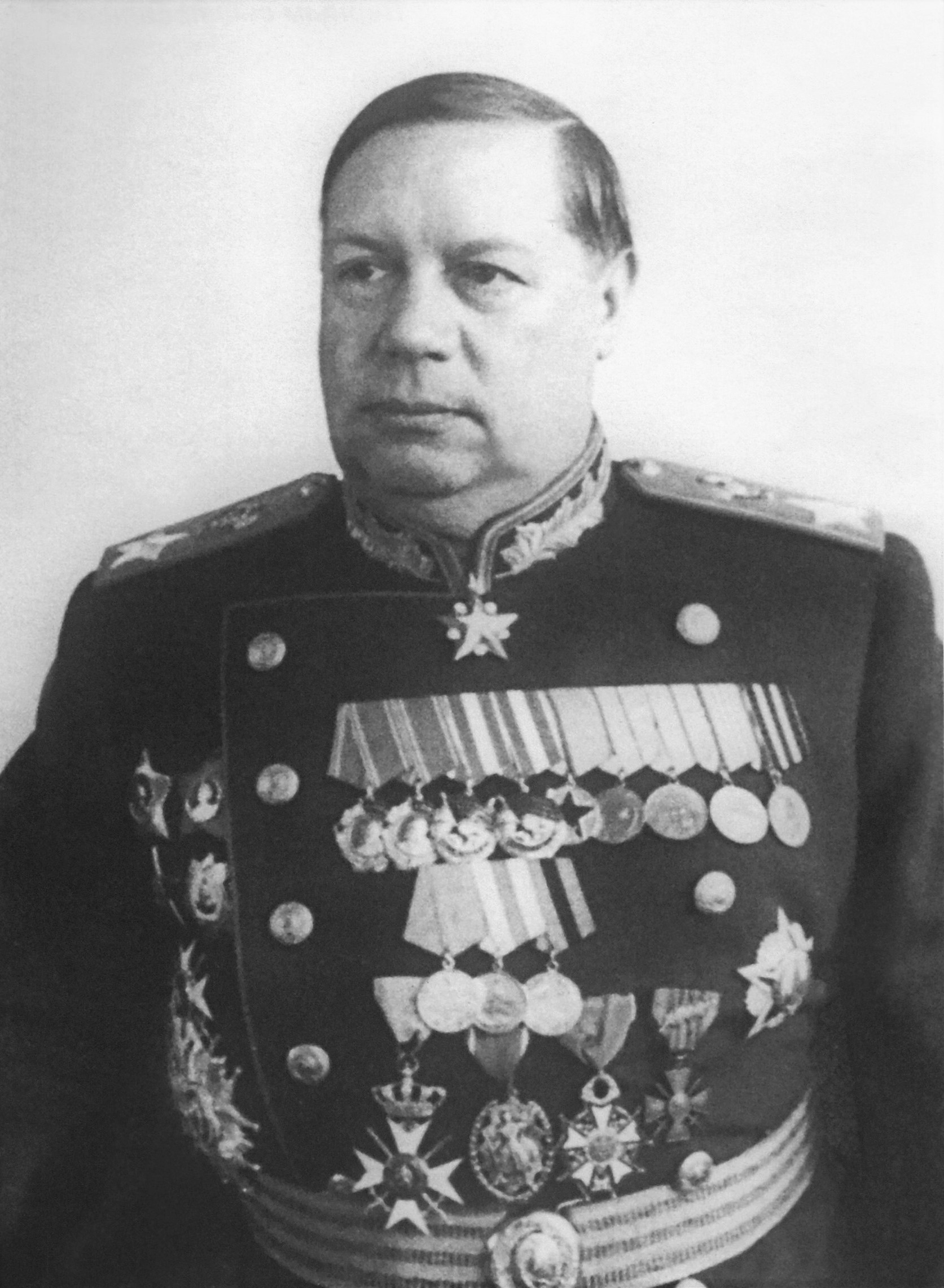 Маршал Советского Союза Ф.И. Толбухин